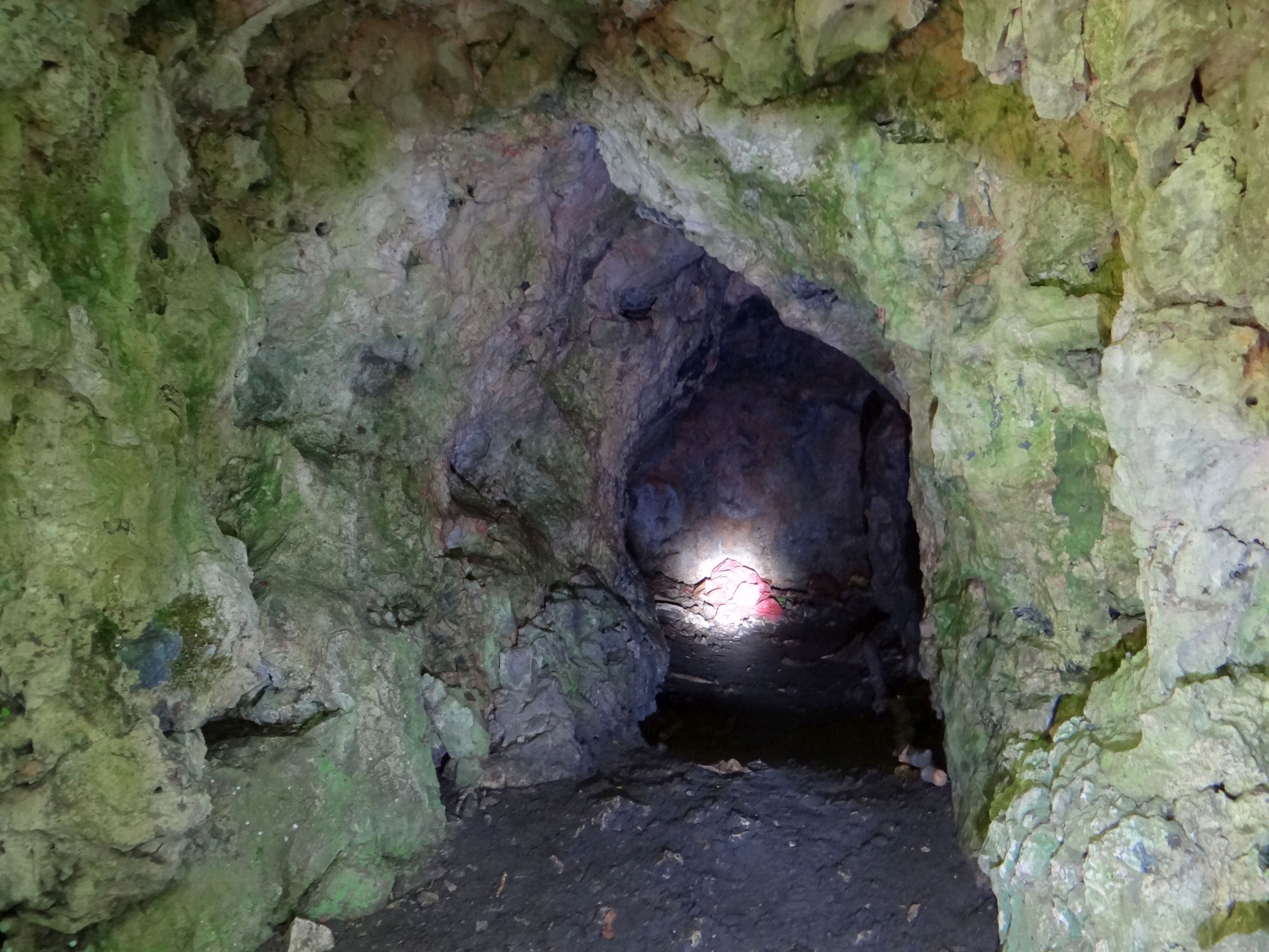 Jaskinia przy Kamyku (Jaskinia Pańskie Kąty) w Nielepicach